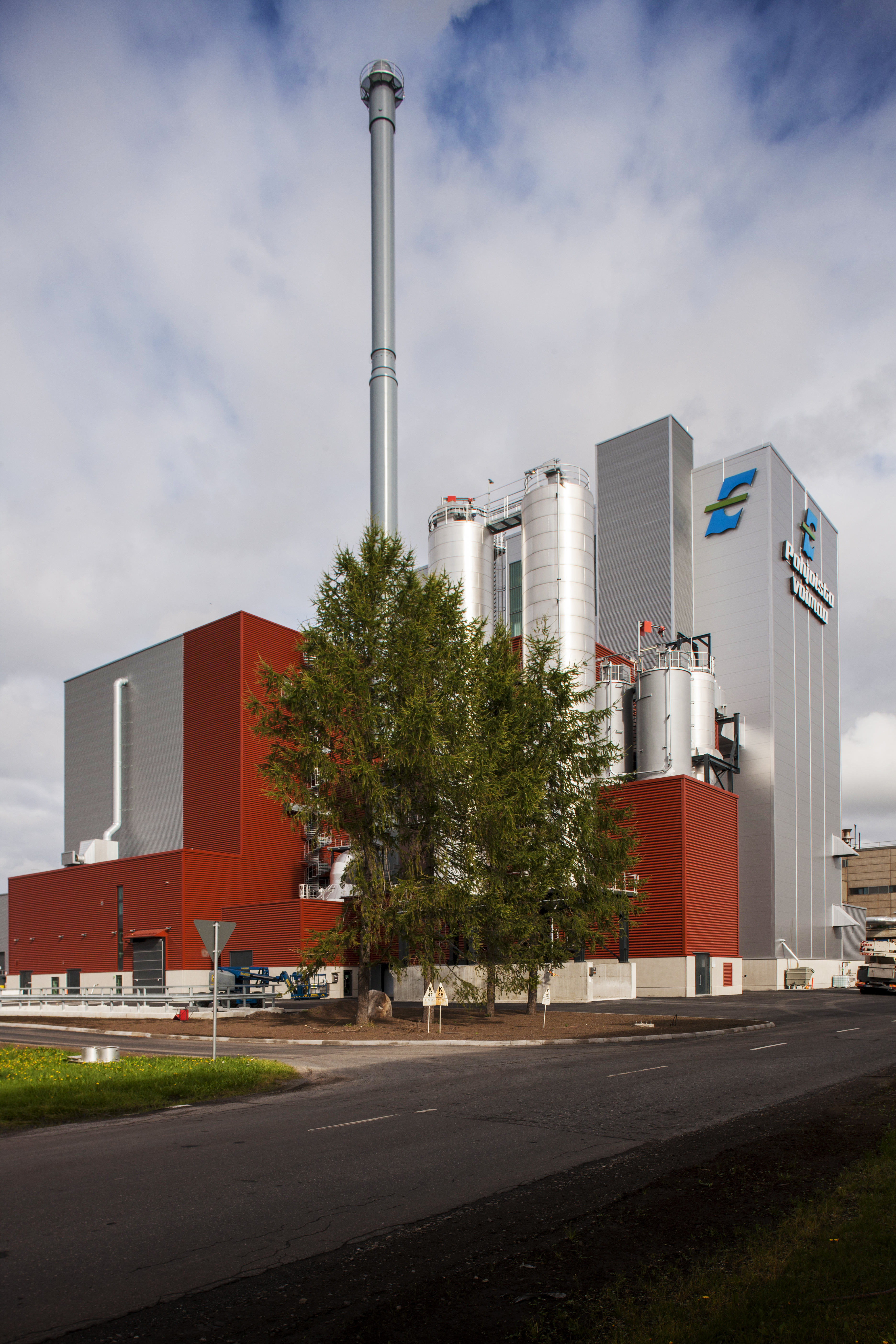 Kuva: © Kati Leinonen ja Oulun Energia